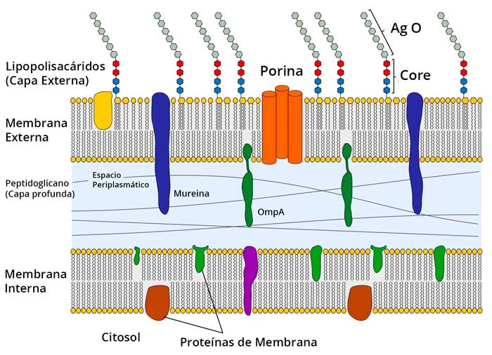 Pared Celular en Bacterias Gram negativas.